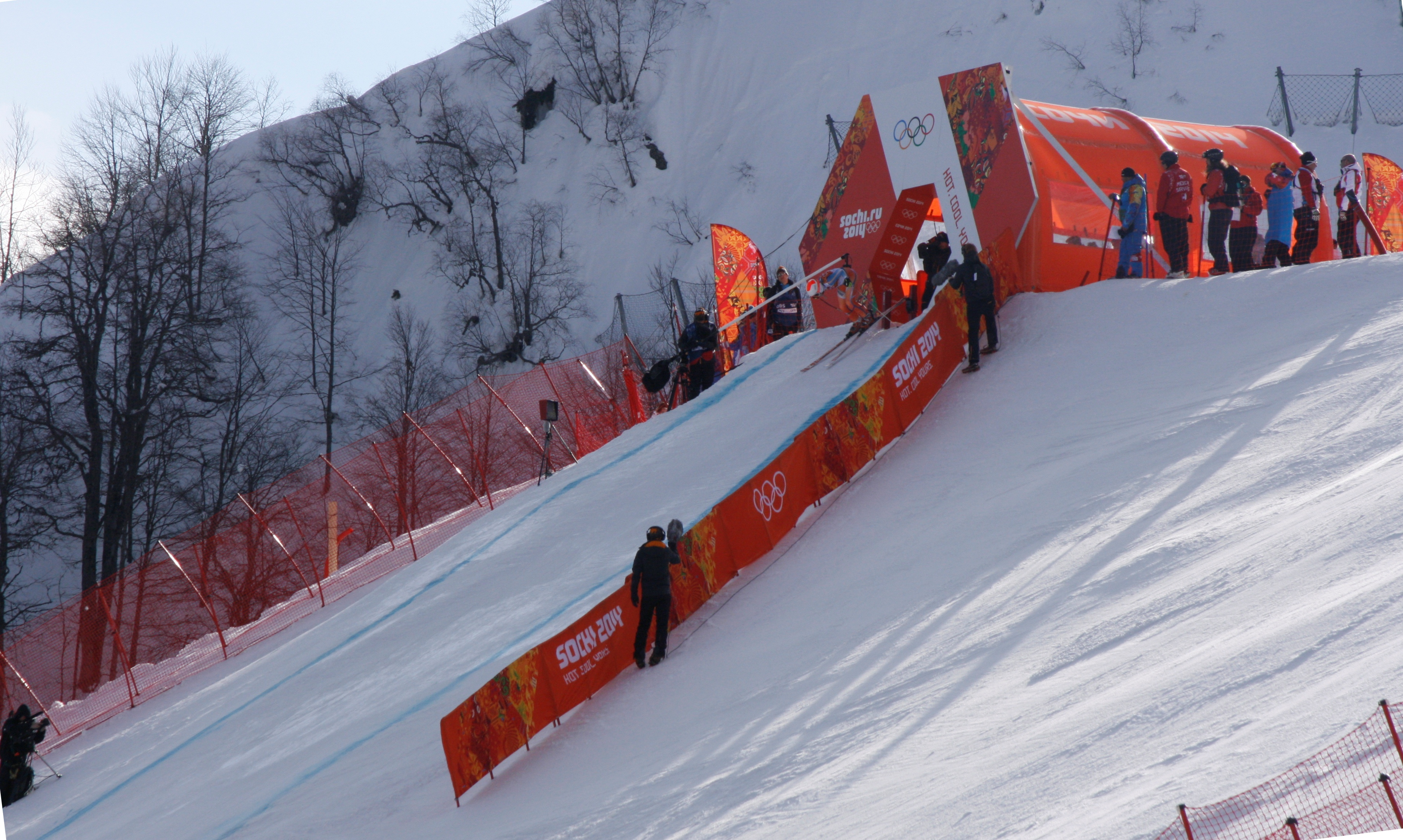 Стартовая зона женского скоростного спуска на зимних Олимпийских играх 2014 в Сочи